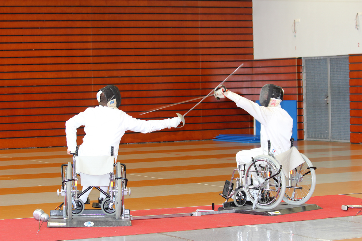 Escrime en fauteuil